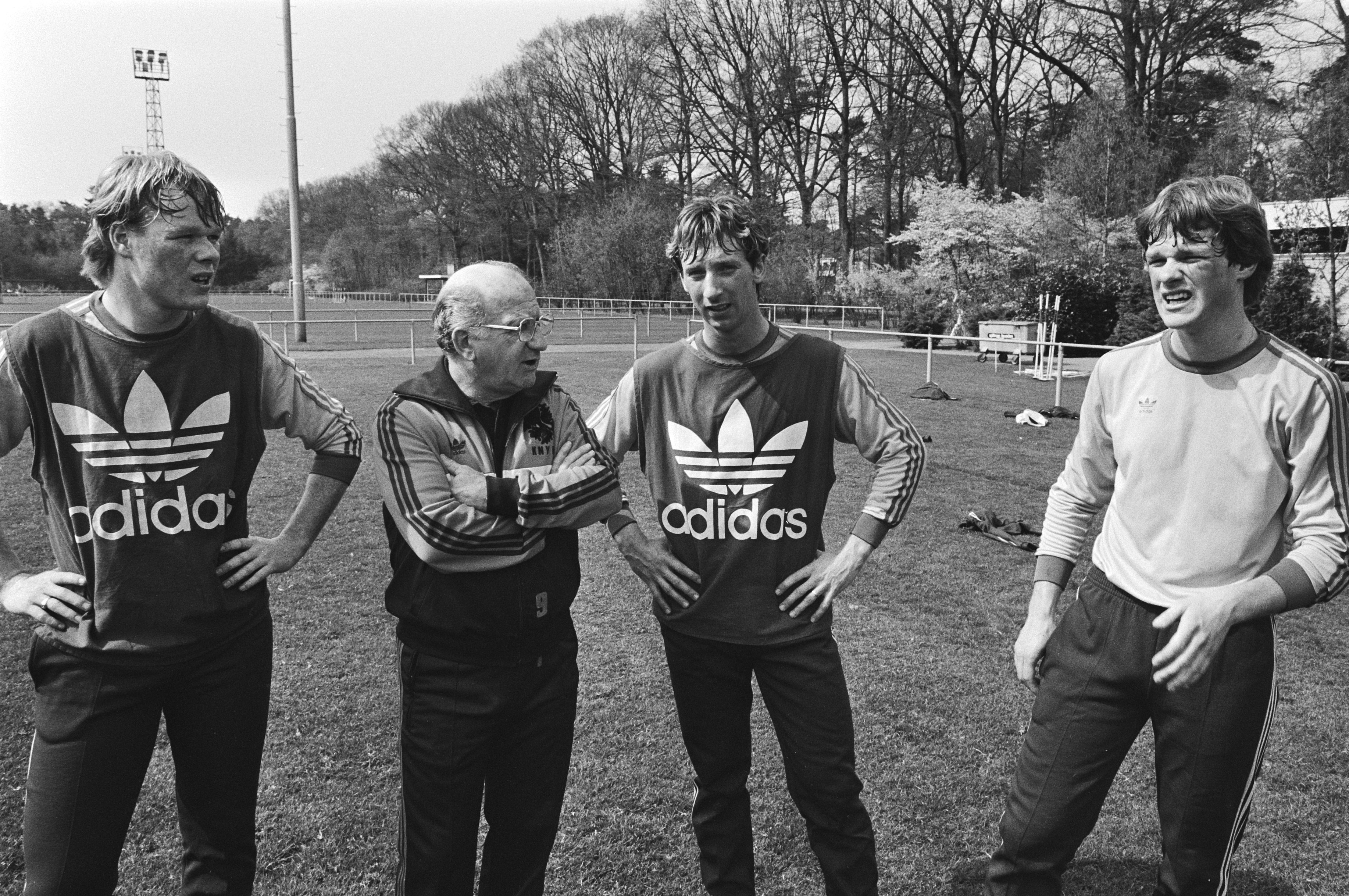 Entraînement de l'équipe néerlandaise de football à Zeist. De gauche à droite, Ronald Koeman, l'entraîneur Kees Rijvers, Wim Hofkens et Erwin Koeman. Photographie par R.C. Croes / Anefo.